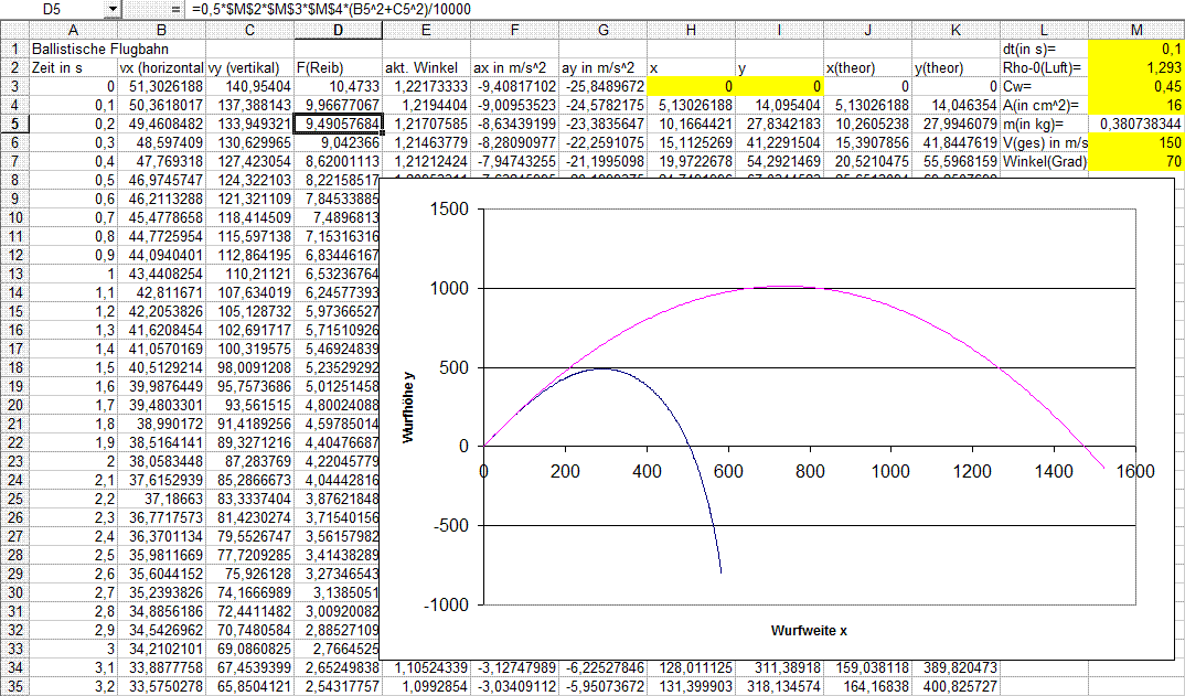 Tabelle zur Berechnung der ballistischen Flugbahn